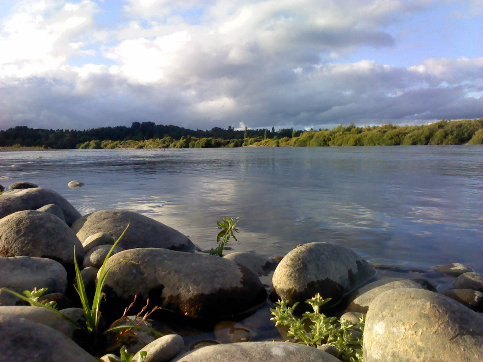 Río Toltén en Pocoyan